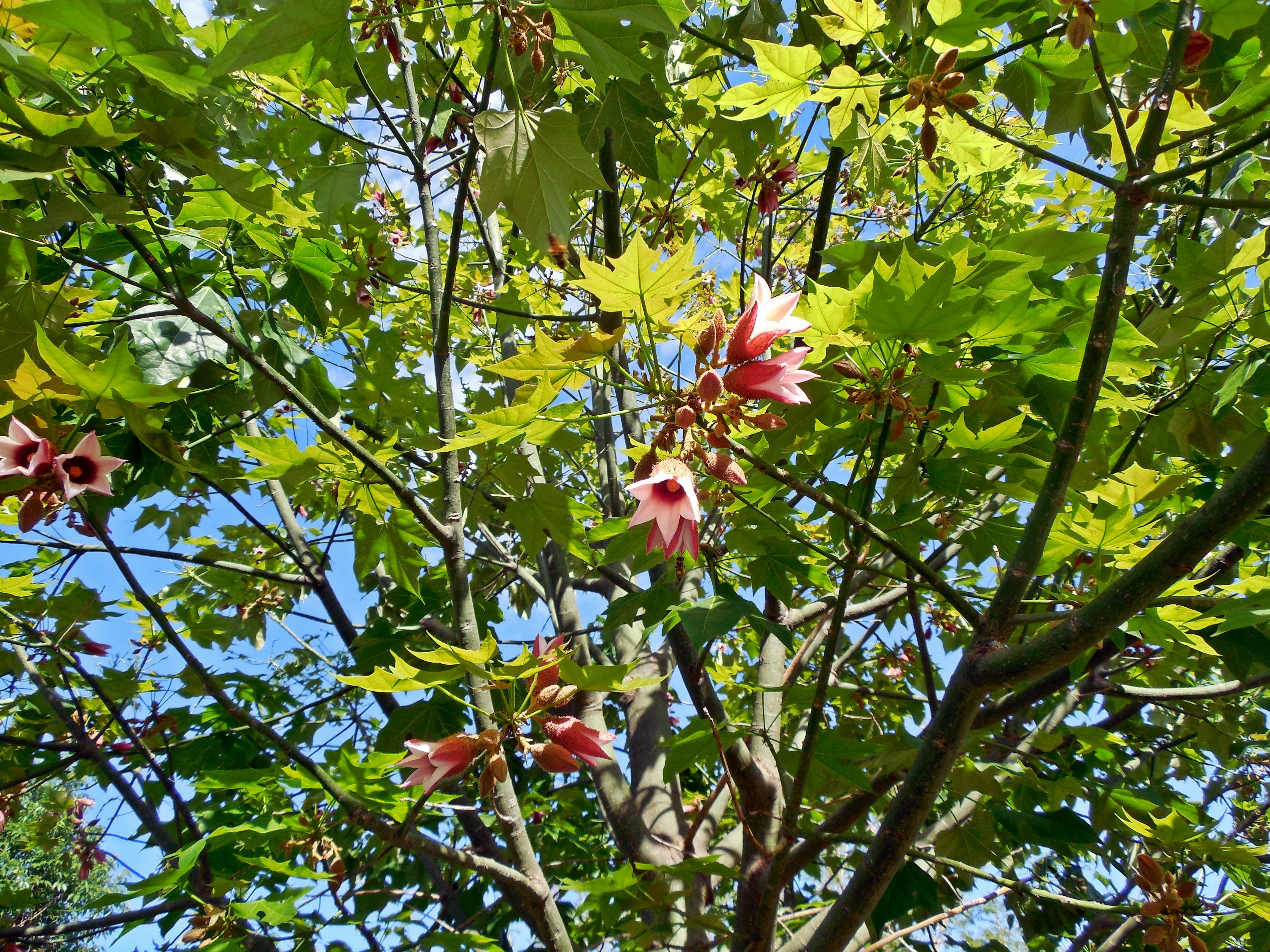 Brachychiton discolor, con flores, en Rosario, Argentina